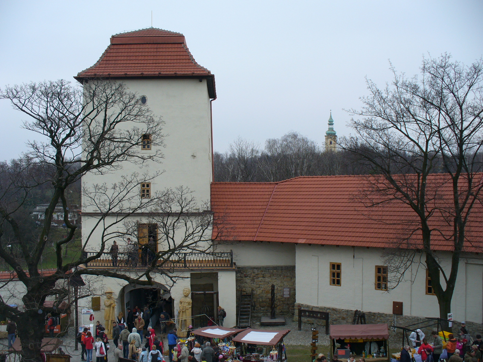 Slezskoostravský hrad. Śląskoostrawski zamek